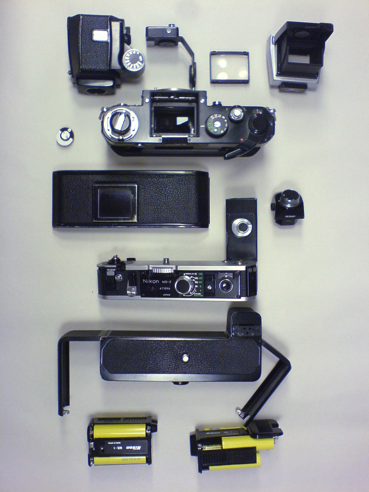 Module der Nikon F2